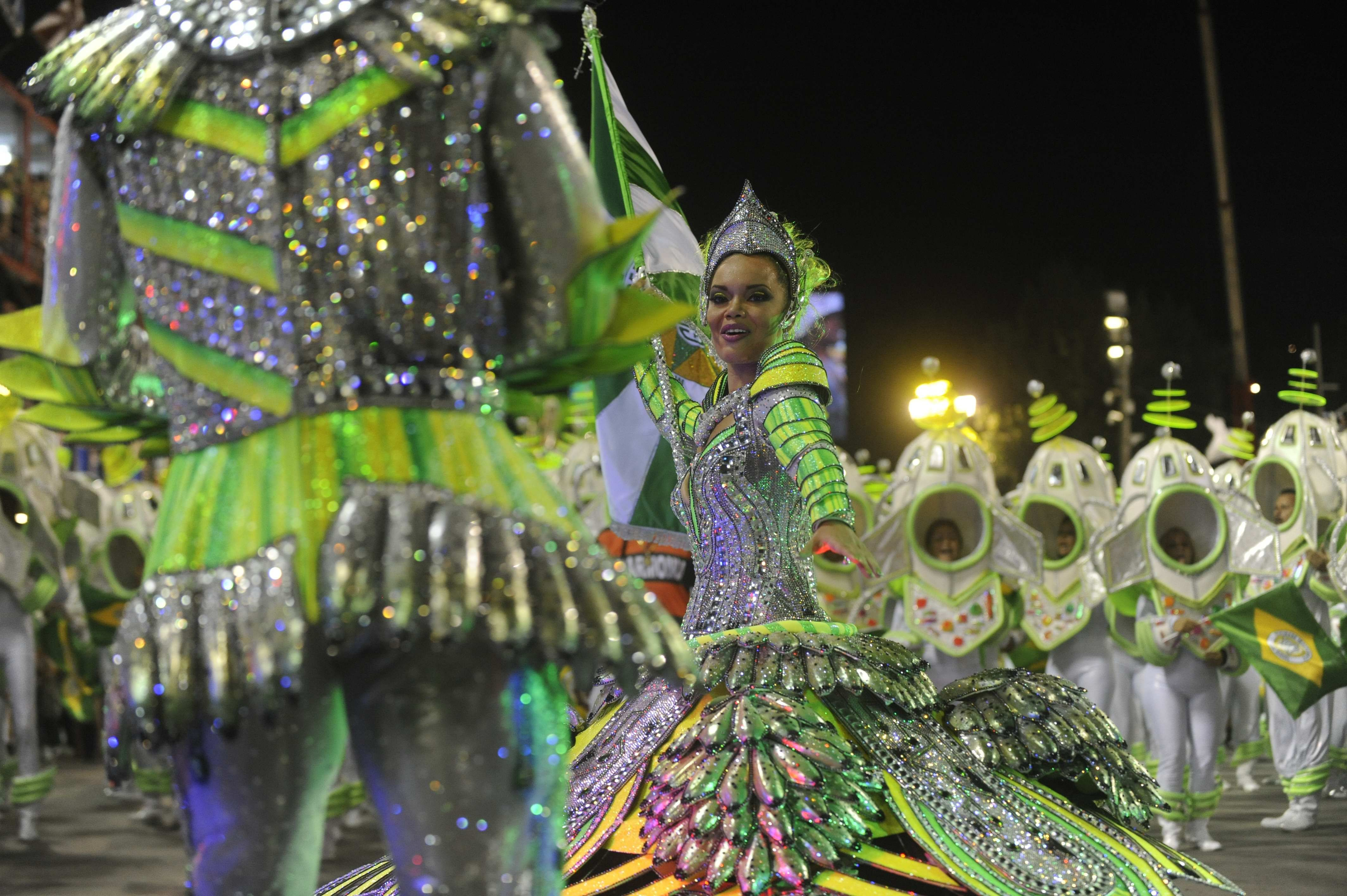 Rio de Janeiro - Escolas de samba do Grupo Especial se apresentam no Sambódromo da Marquês de Sapucaí, no segundo dia de desfiles (Fernando Frazão/Agência Brasil)